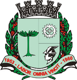 Brasão Oficial do Município de Taboão da Serra